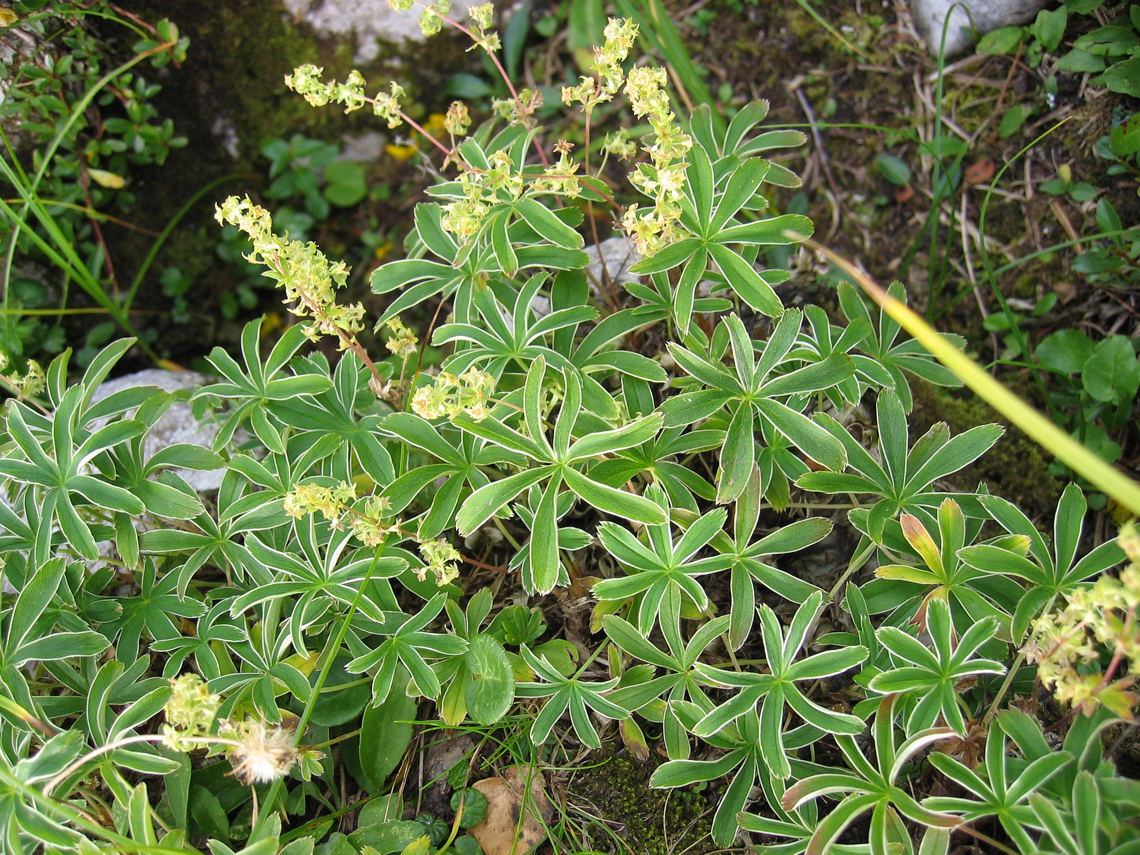 Alchemilla anisiaca, Dachstein, Upper Austria, Austria